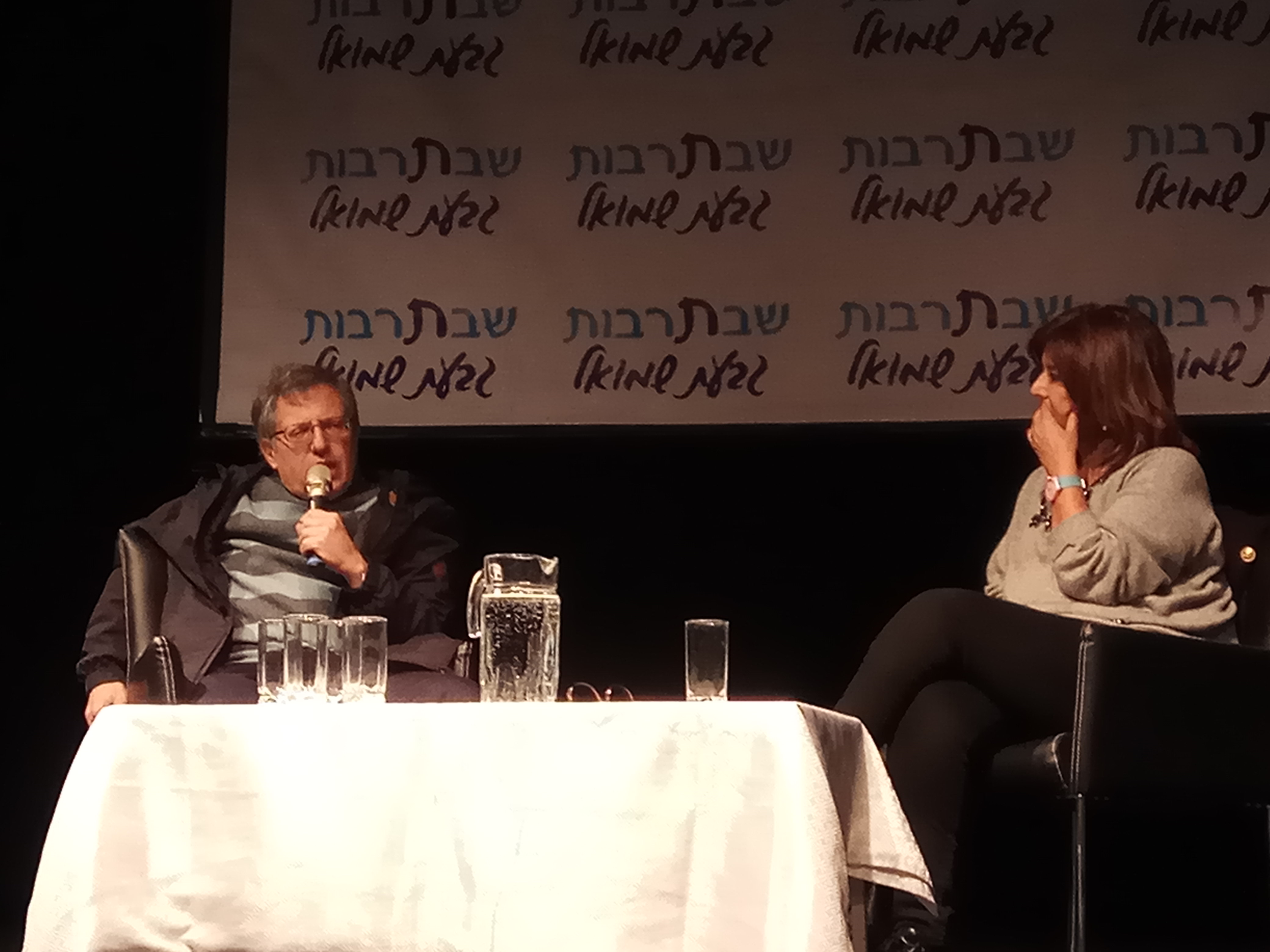 פרופ' מאיר ליטבק באירוע שבתרבות בגבעת שמואל עם רינה מצליח